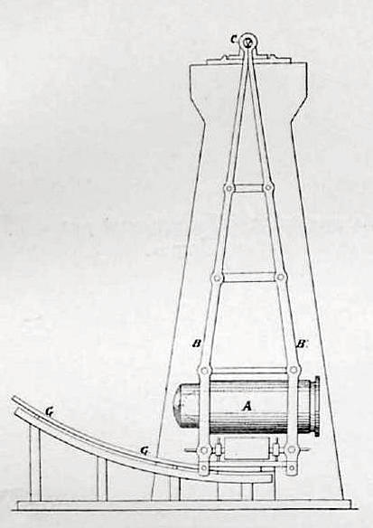 Балистический маятник. Данное изображение было использовано в статье «Балистические приборы» опубликованной в четвёртом томе «Военной энциклопедии», который был издан книгоиздательским товариществом Ивана Дмитриевича Сытина в 1911 году в столице Российской империи городе Санкт-Петербурге.